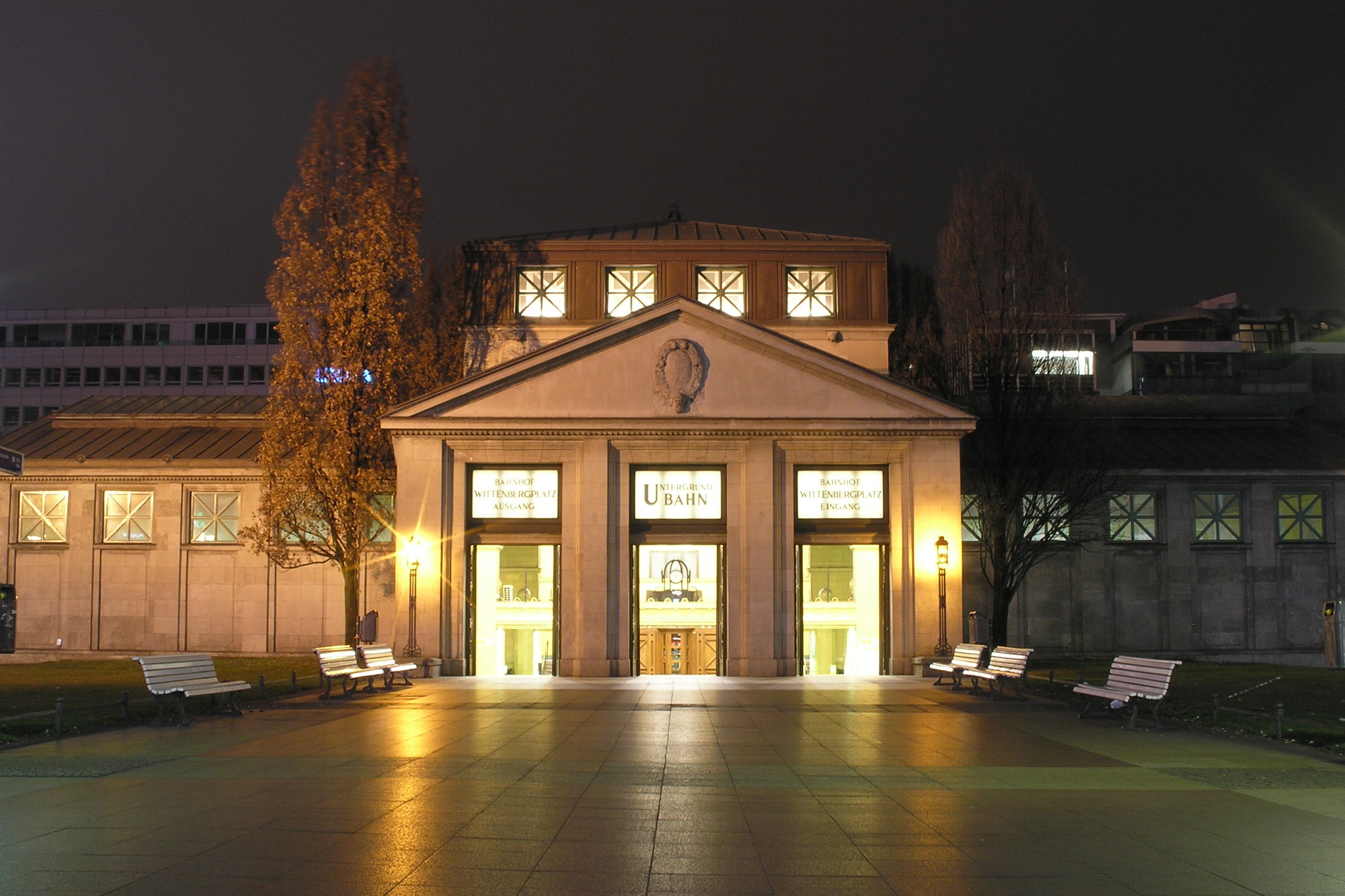 Eingangsgebäude des Berliner U-Bahnhofs Wittenbergplatz, aufgenommen aus westlicher Richtung